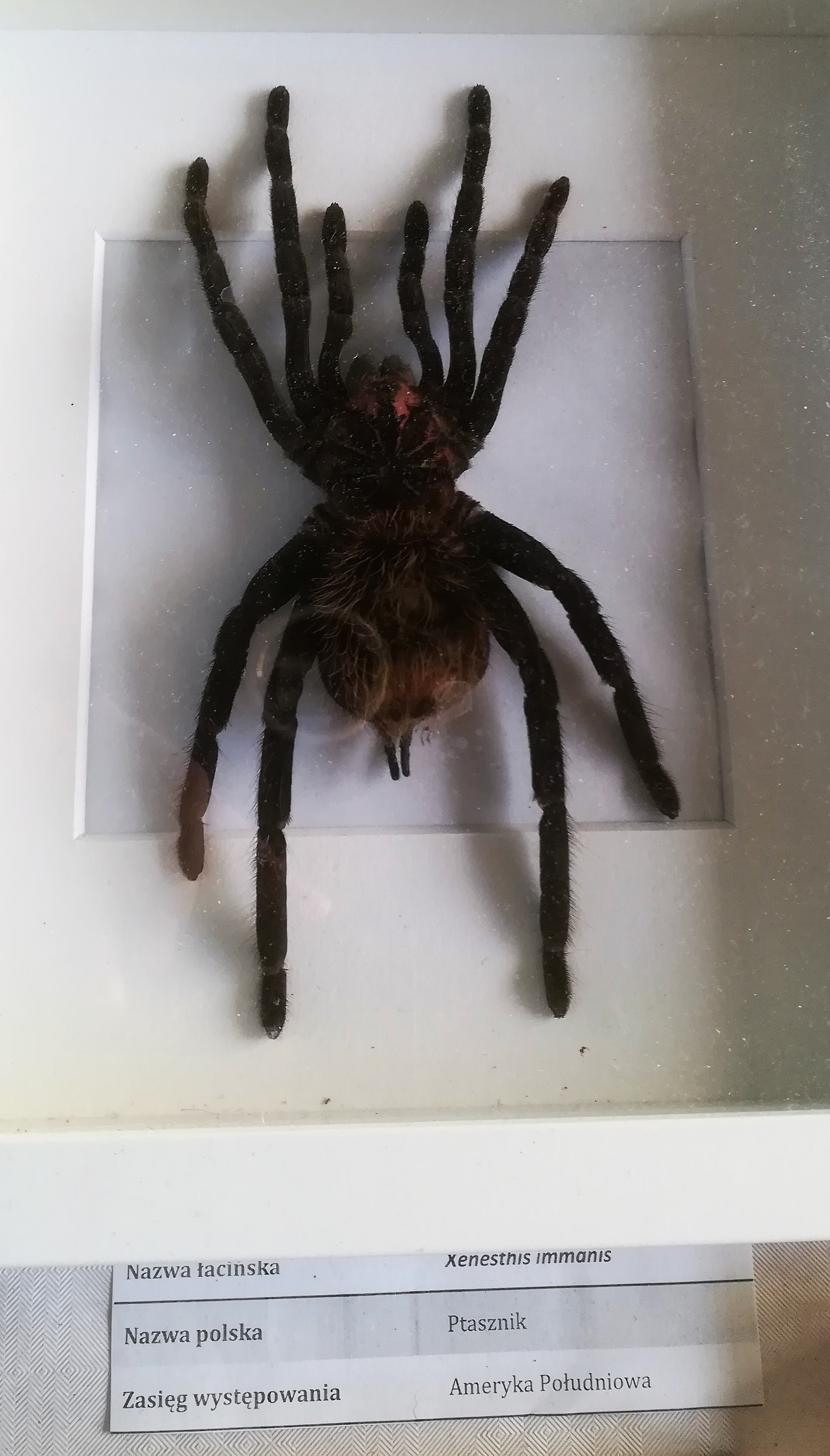 Xenesthis immanis w Biocentrum w Poznaniu.